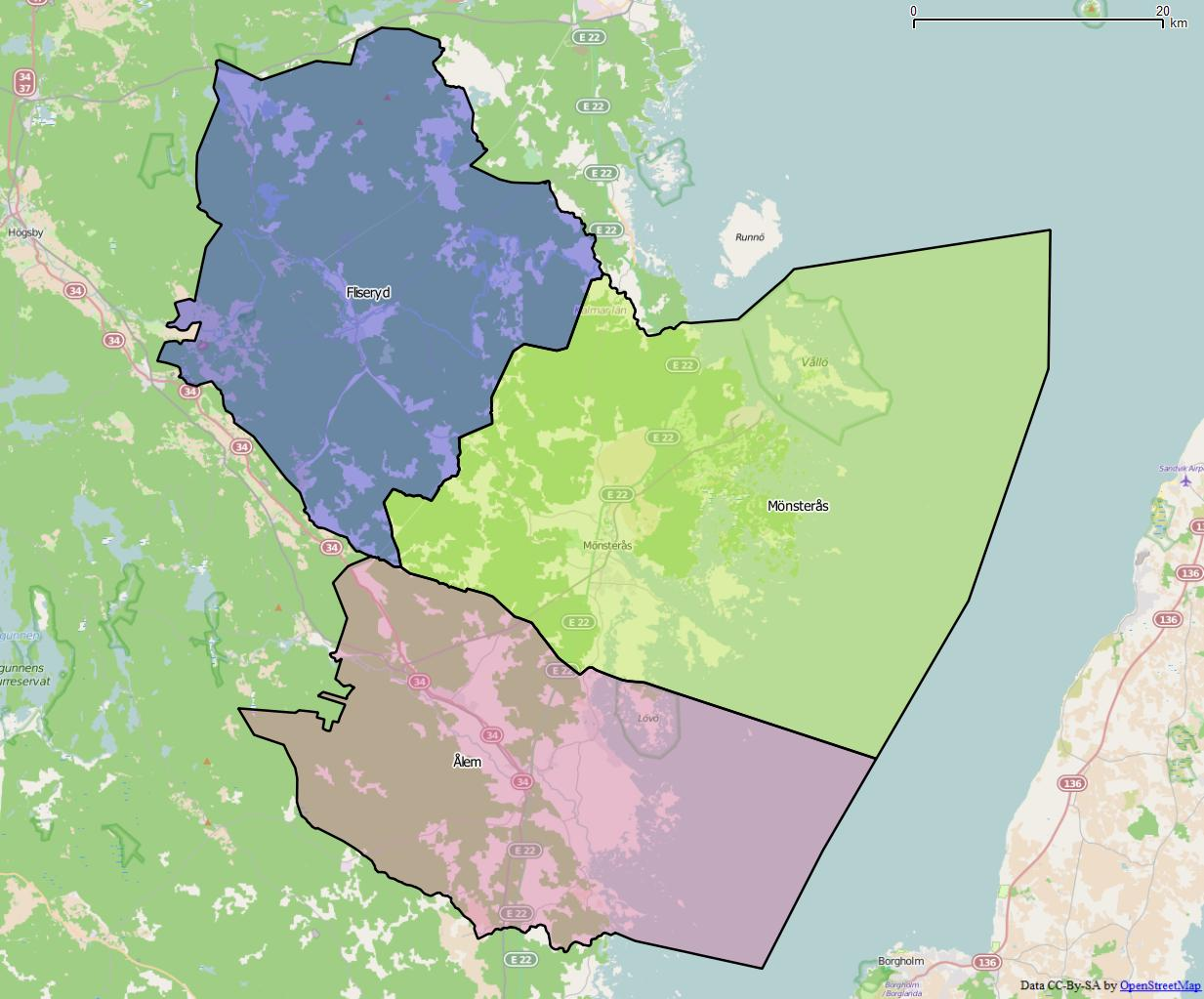 Distriktsindelningen i Mönsterås kommun World file: 78.27382271236695033 0 0 -78.27382271236695033 1781988.77305389731191099 7812557.15730368997901678